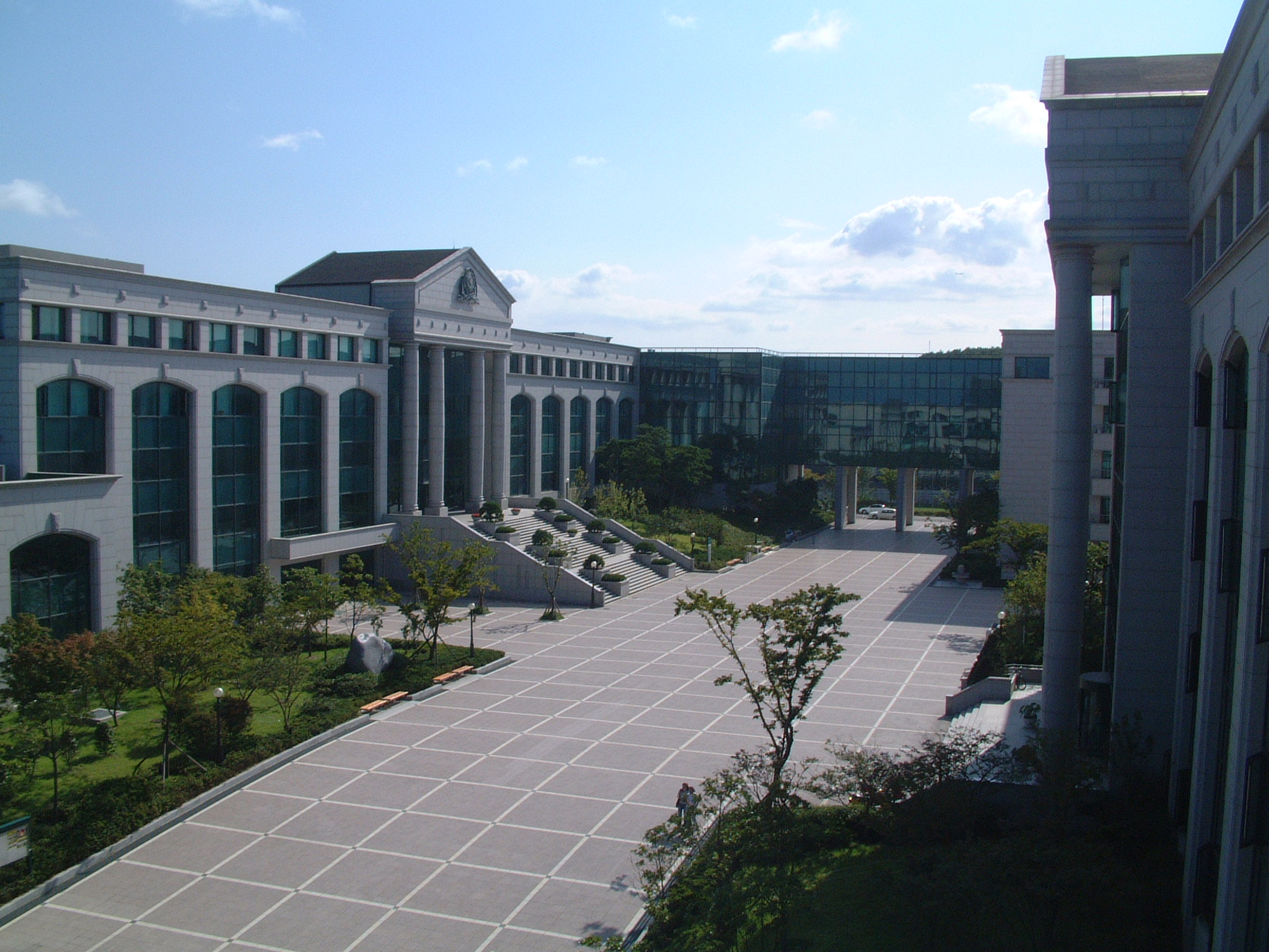 울산과학대학교